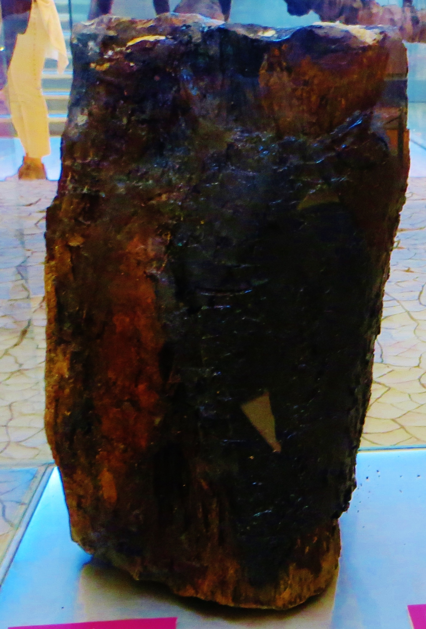 Fossil of Podocarpoxylon, an extinct plant- Took the picture at Muse (Trento)